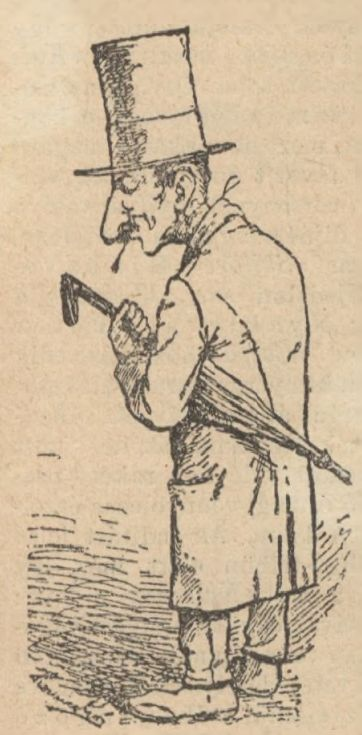 Sanyaró Vendel figurája a Borsszem Jankóban